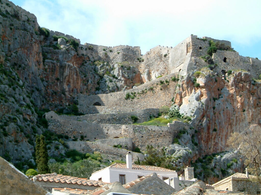 Monemvasia Aufgang zur Zitadelle,von der Unterstadt aus gesehen